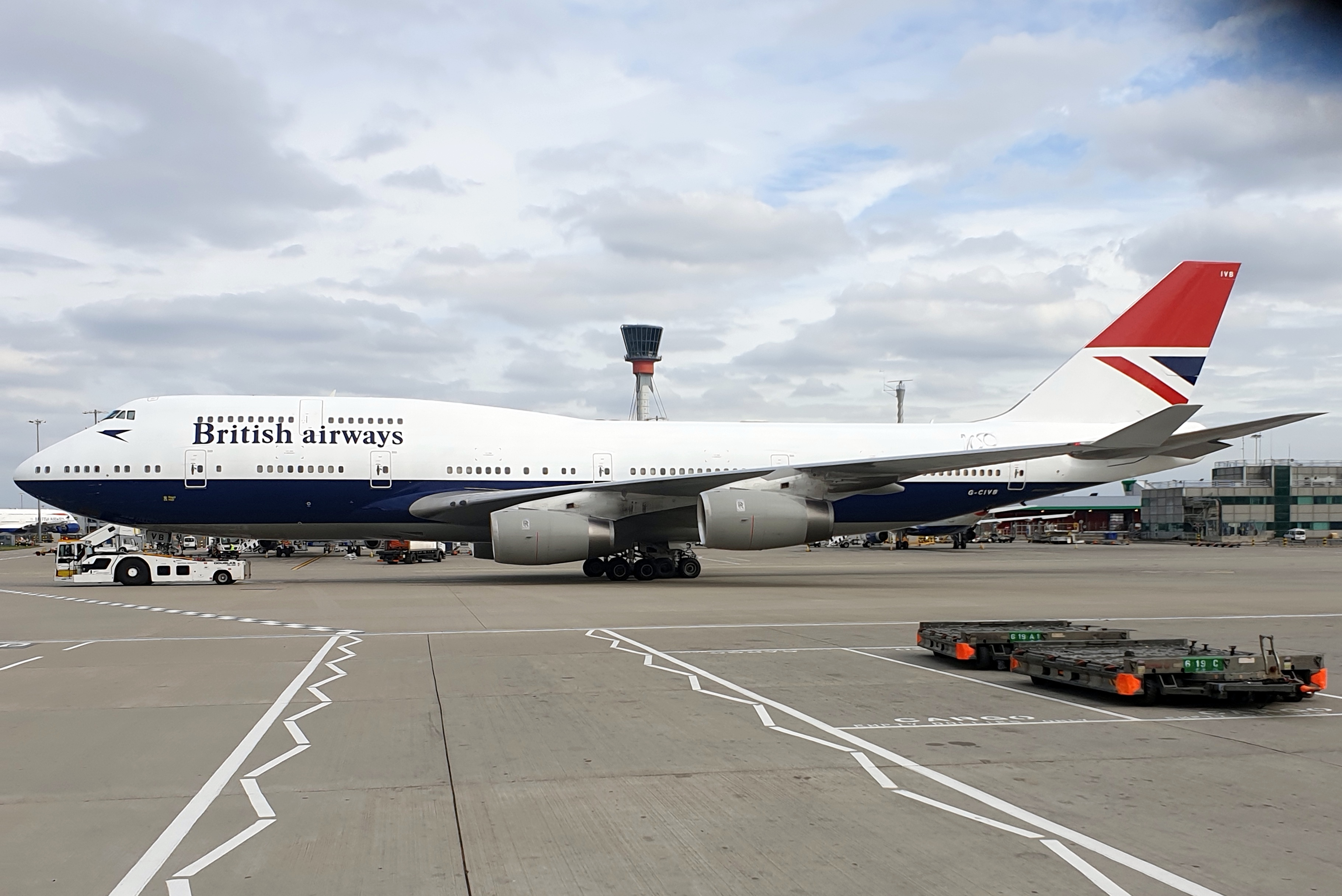 G-CIVB 23032019LHR BA275 LHR-LAS